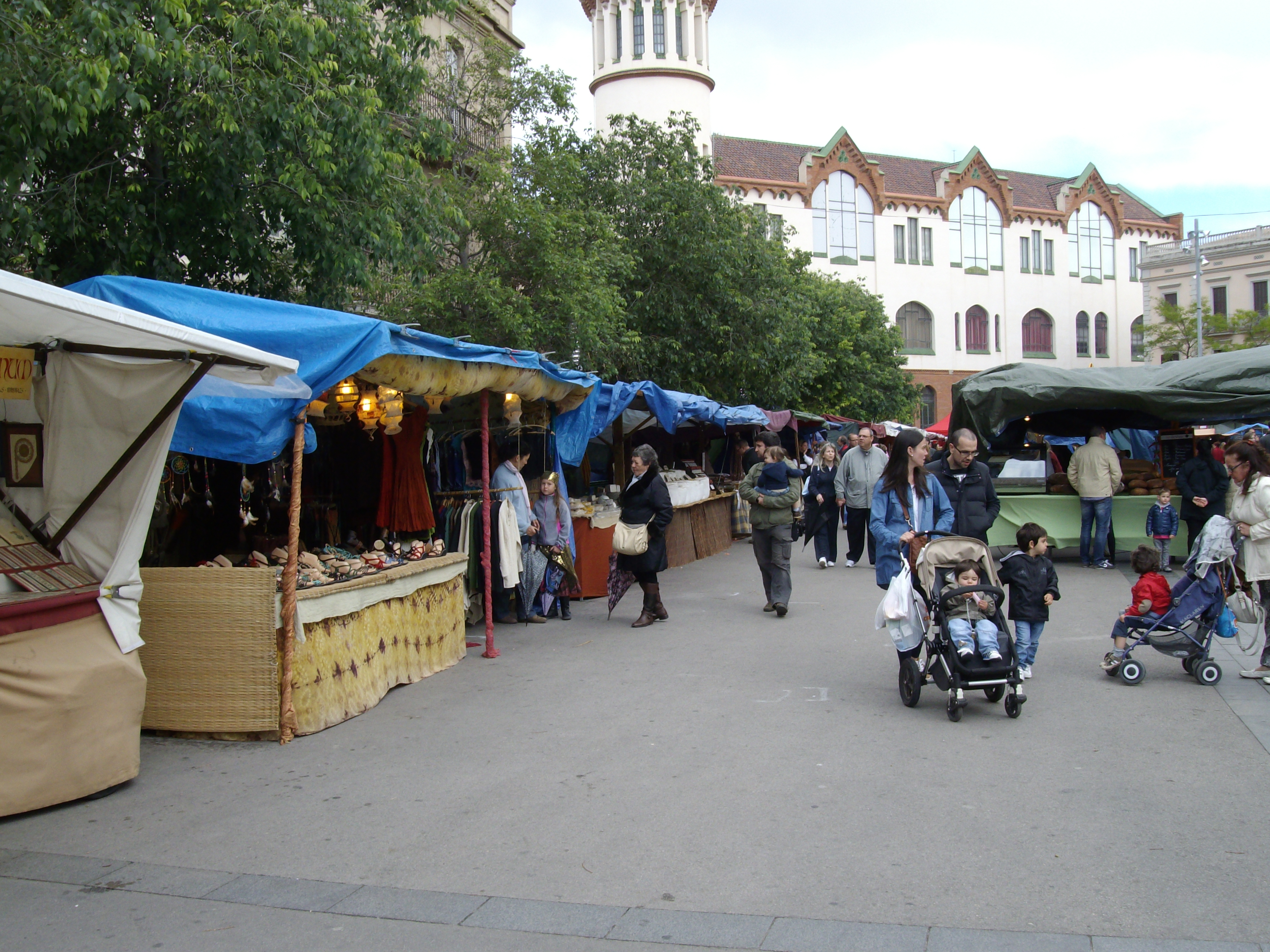 Feria medieval Medievàlia, celebrada los días 17, 18 y 19 de mayo de 2013 alrededor de la plaza del Mercado de Sabadell (Barcelona).